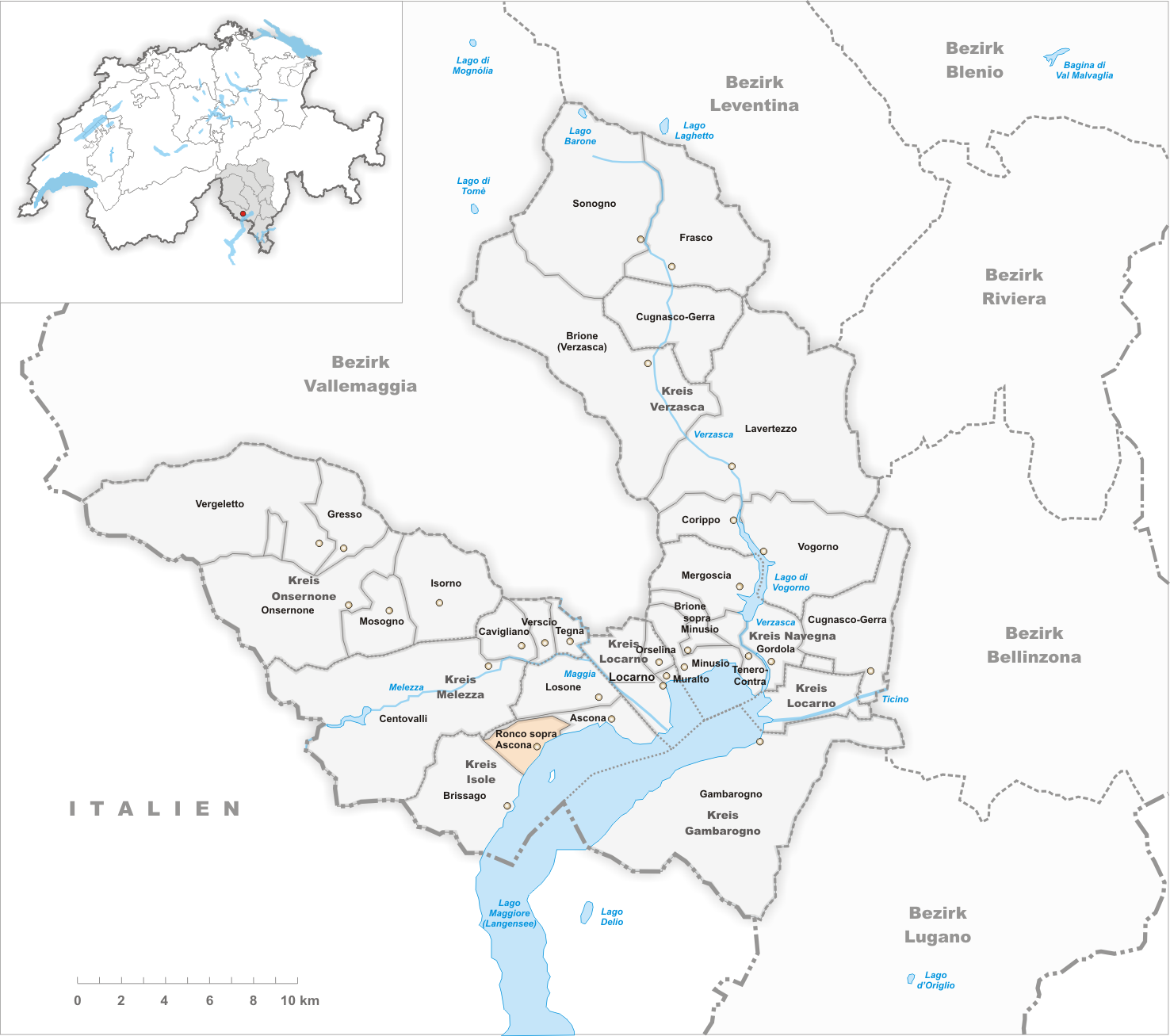 Municipality Ronco sopra Ascona Artist: Tschubby